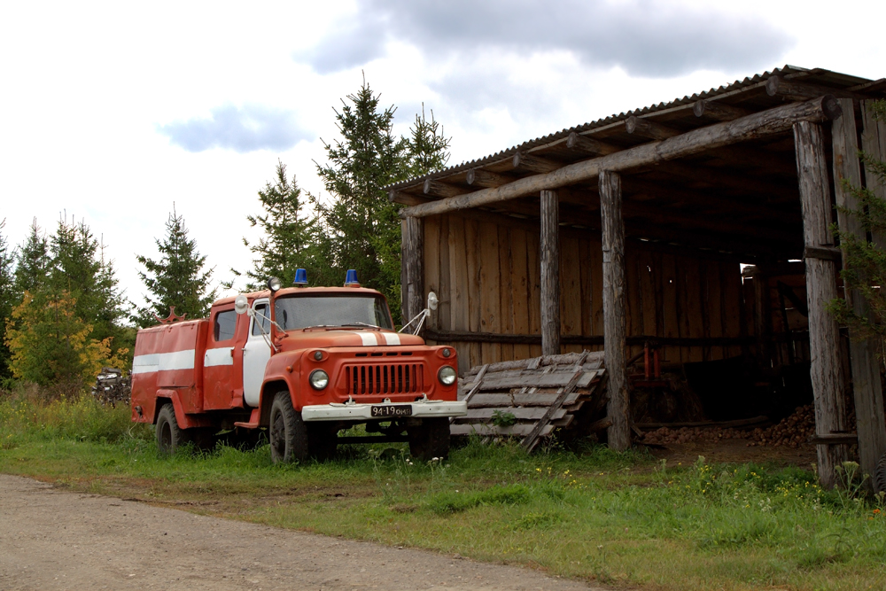 Брошенный пожарный автомобиль ГАЗ-53 в селе Бутаково Знаменского района Омской области.